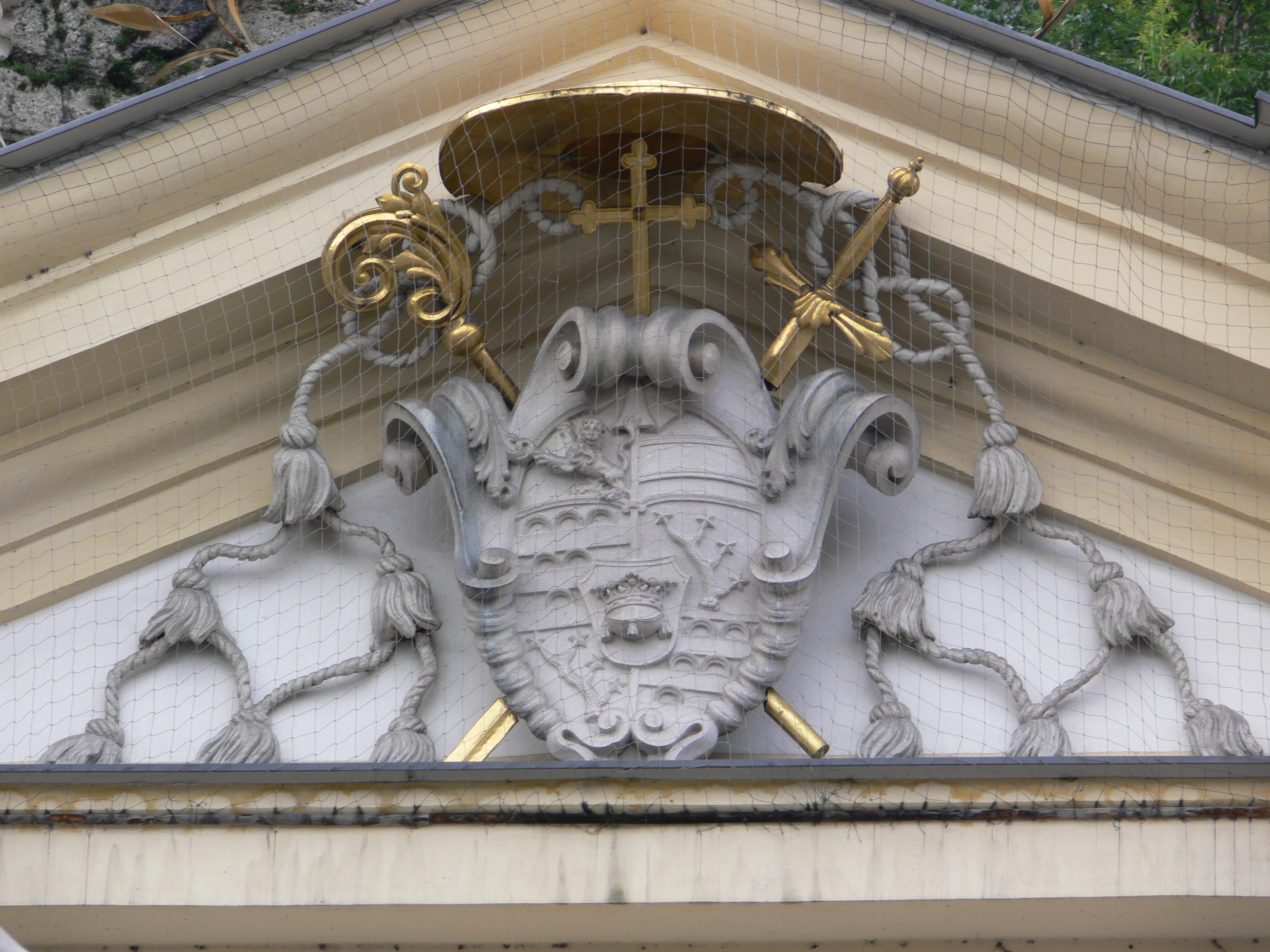 Salzburg, Pferdeschwemme (Herbert-von-Karajan-Platz), Wappen des Erzbischofs Leopold Anton Eleutherius von Firmian